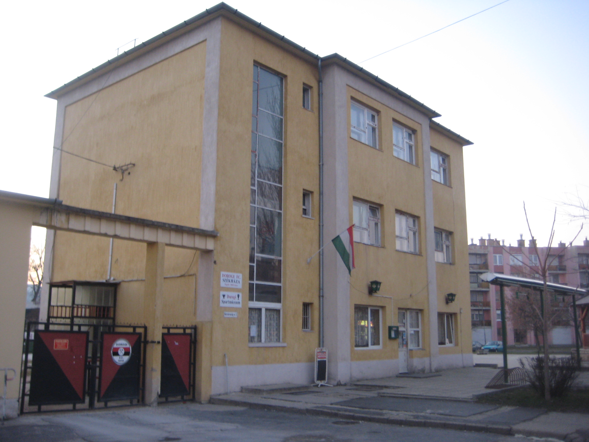 Dorogi Sportmúzem